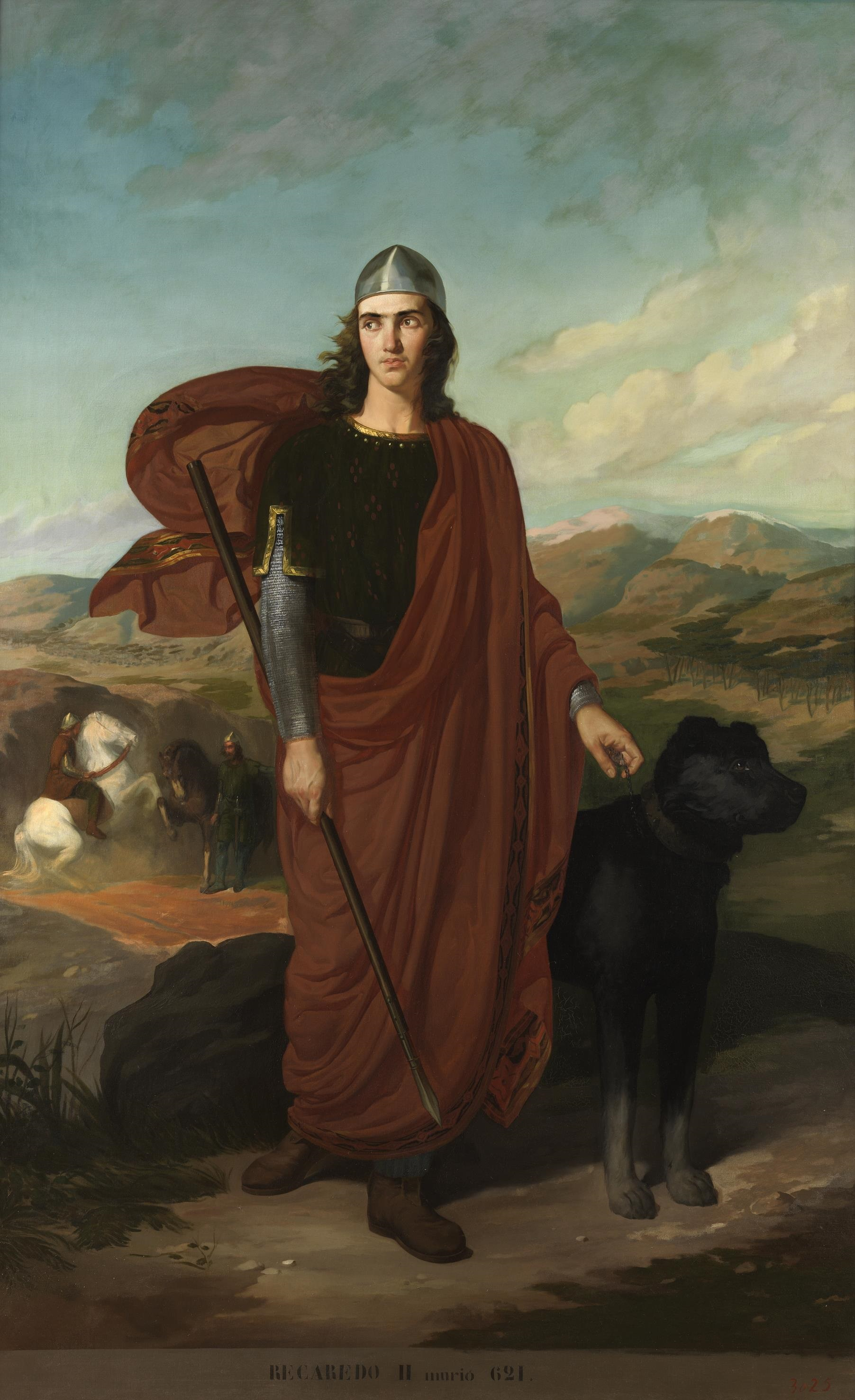 Retrato imaginario de Recaredo II († 621), rey de los Visigodos e hijo y succesor del rey Sisebuto.